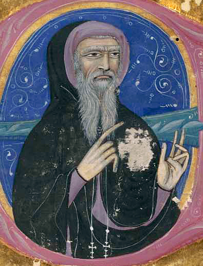 Retrato de Juan Fernández de Heredia (1308?-1396) con el hábito de San Juan de Jerusalén (cuya cruz de Jerusalén ha sido borrada en el manuscrito) en el íncipit de la [ Grant Coronica de los conquiridores. Segunda partida]